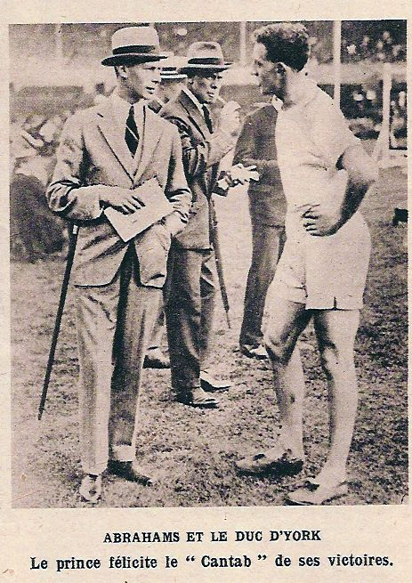 Harold Abrahams, ici au stade Pershing à Paris en 1923. le film "Les chariots de feu" raconte l'histoire des deux athlètes Harold Abrahams et Eric Liddell.